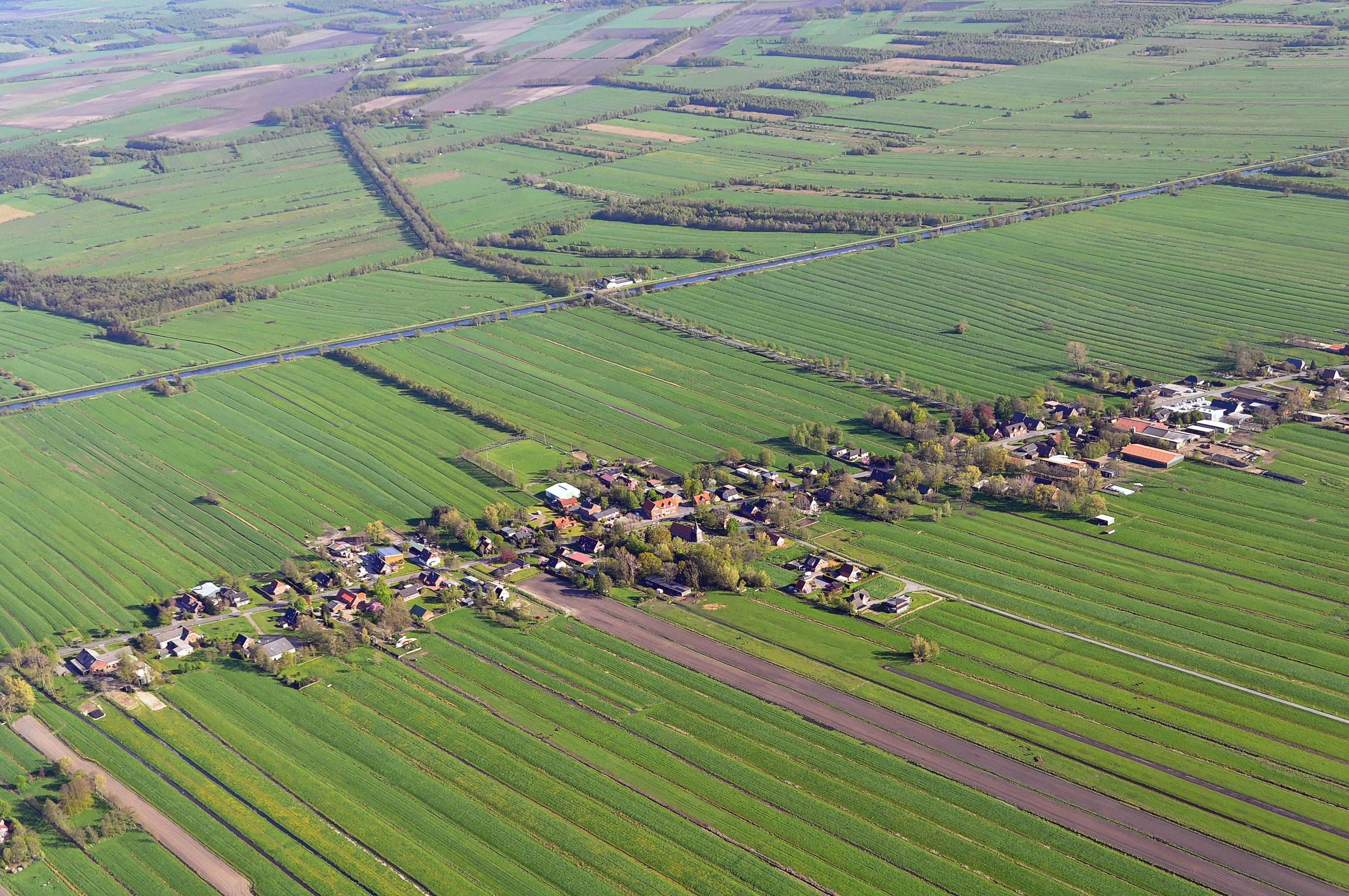 Luftbilder von der Nordseeküste 2012-05